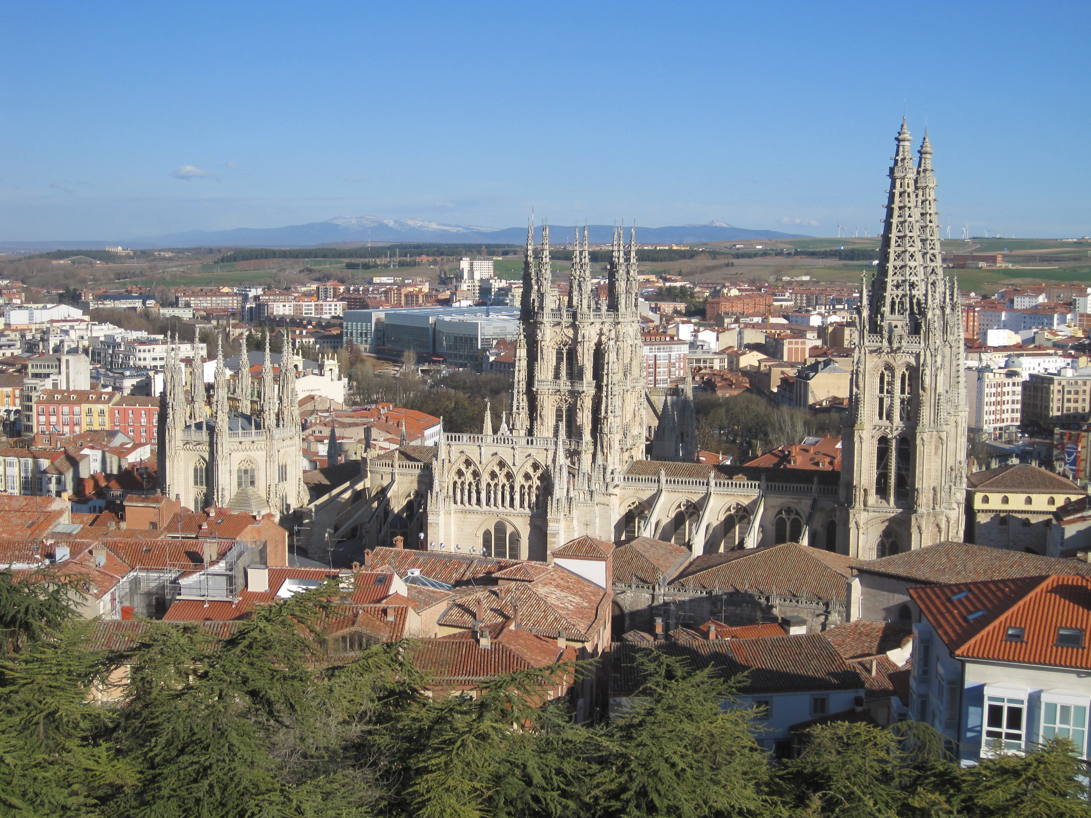 Vista de Burgos desde el Mirador.